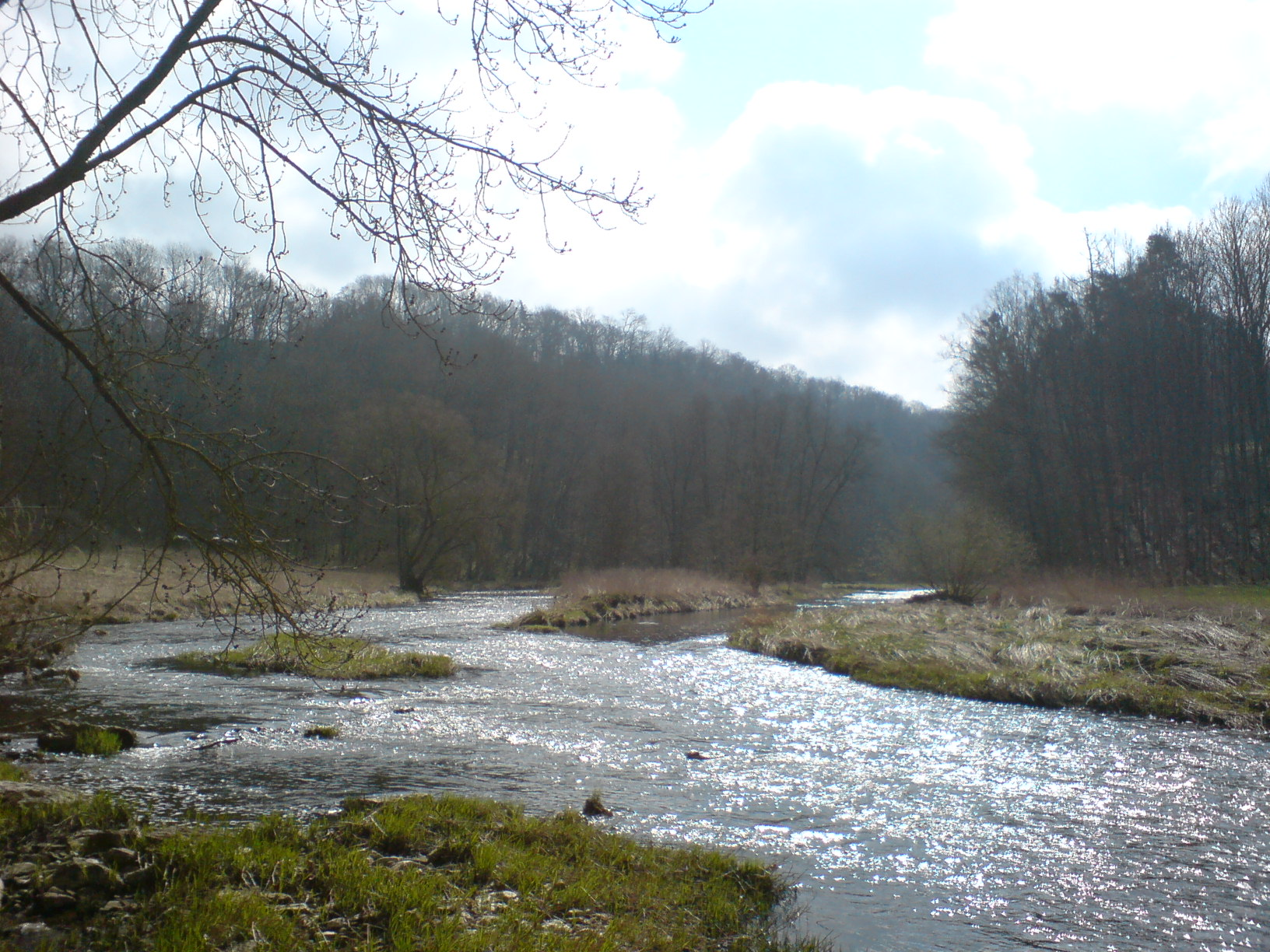 Jagst unterhalb des Bärensteins bei Bölgental in der Nähe von Kirchberg an der Jagst. Europäisches Vogelschutzgebiet „Jagsttal mit Seitentälern“. Der Fluss gabelt sich hier in zwei Arme und bildet eine größere und mehrere kleine Inseln.